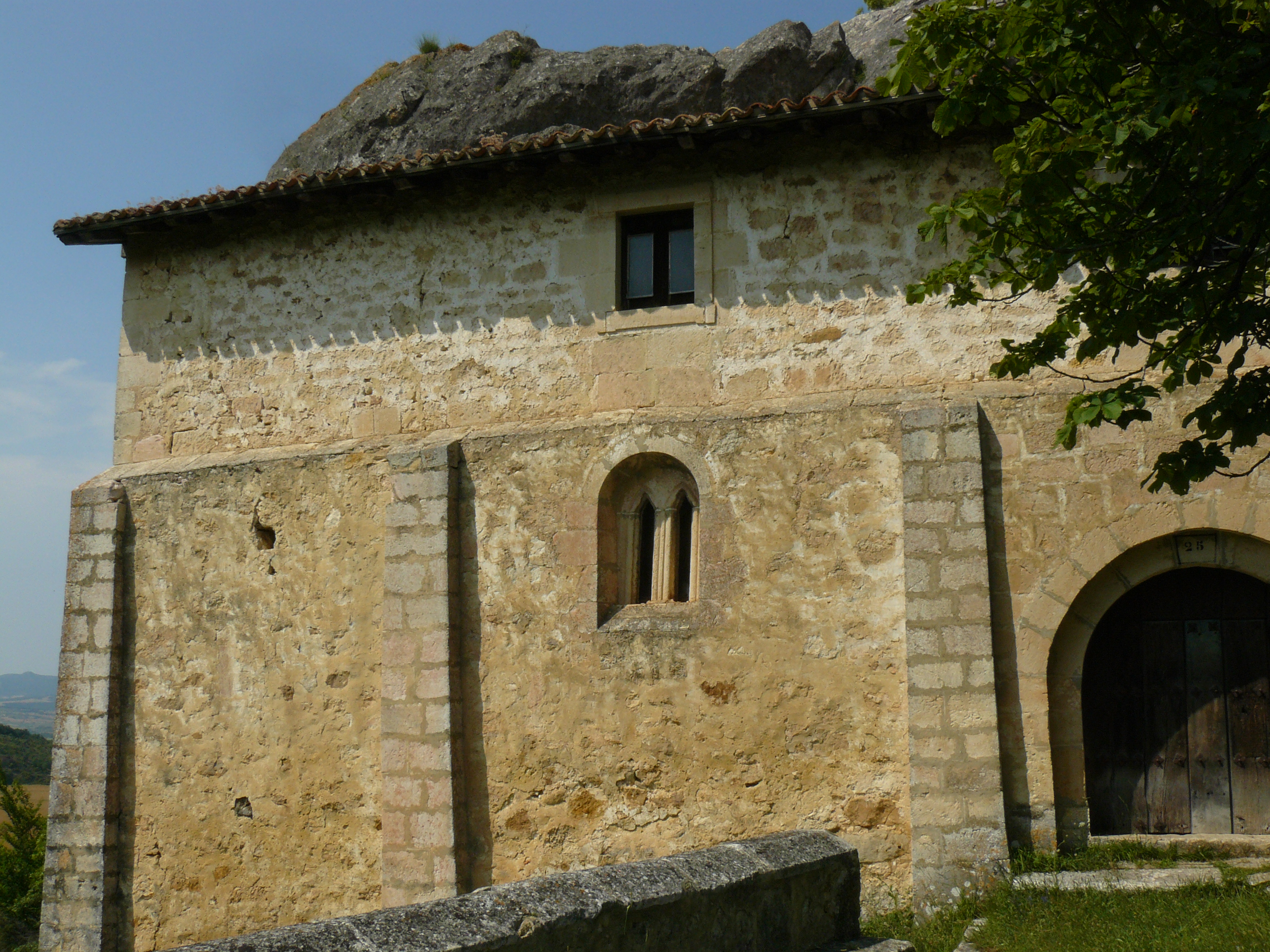 Faido / Euskadi (Baskenland) Position: 42.665097, -2.654288